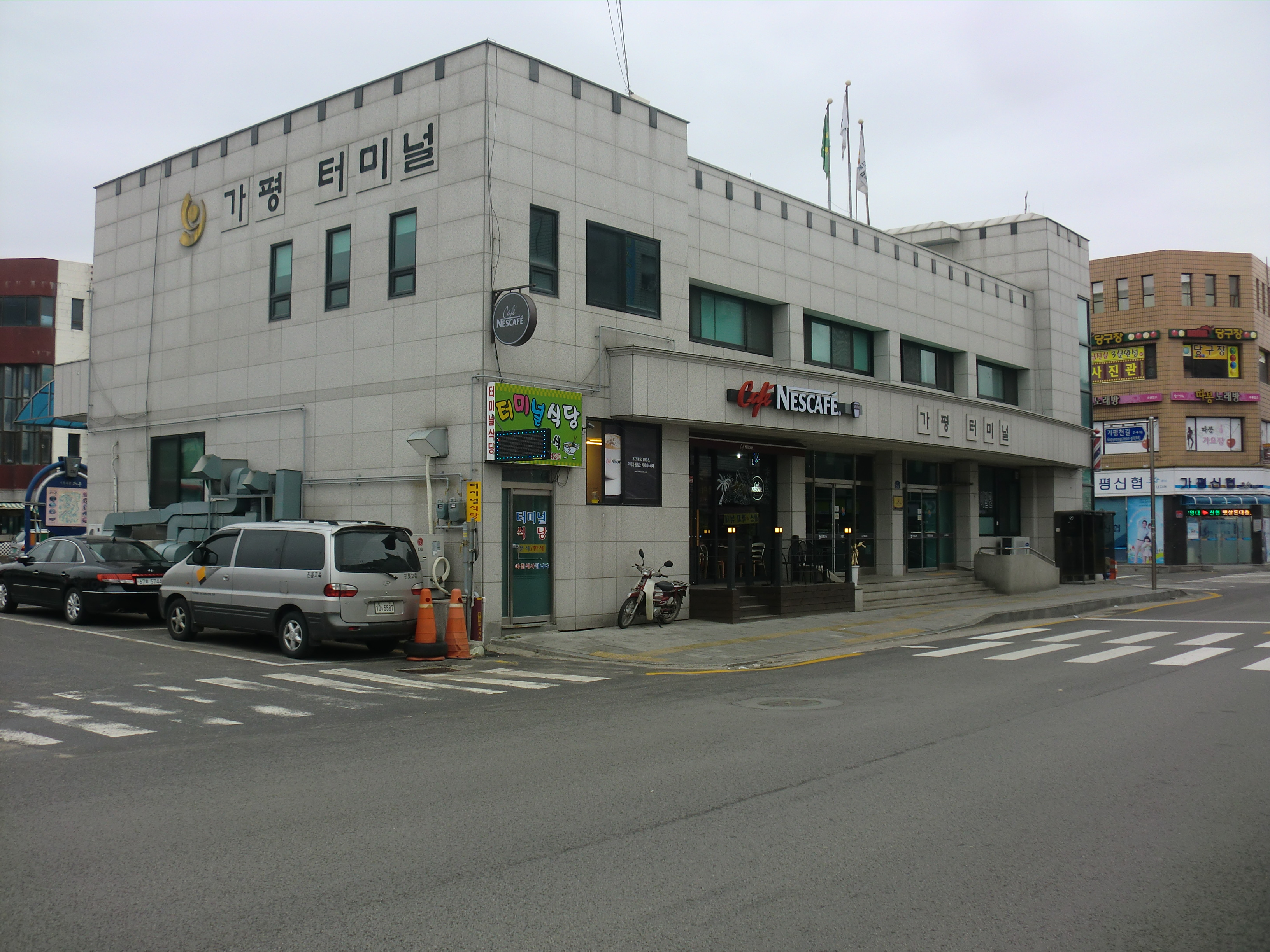 경기도 가평군에 있는 가평터미널